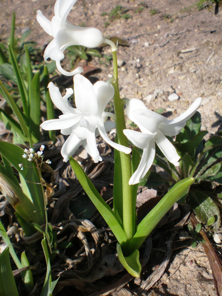 Hiacintas Foto: Hugo.arg 2007.04.22 (Hyacinthus orientalis)